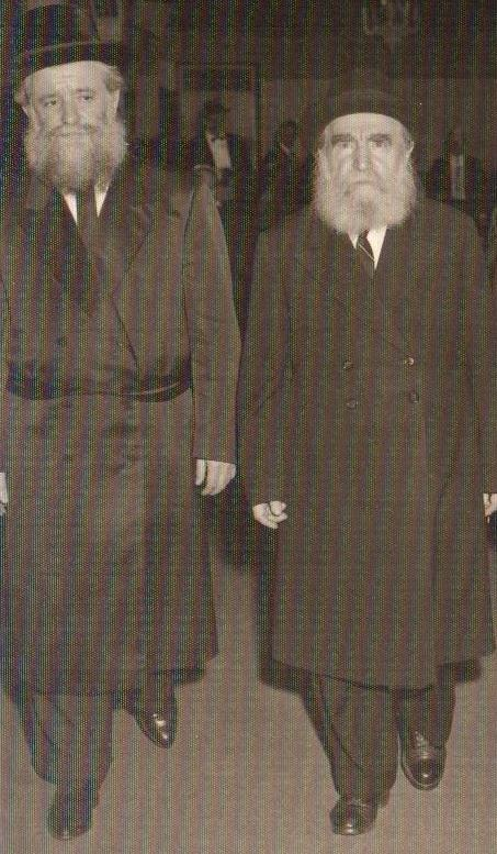 הגאון רבי משה פיינשטיין באחד האירועים של סיום המשנה היומית בארה"ב ליד מייסד ארגון משנה והלכה יומית הרב יונה שטנצל זצ"ל